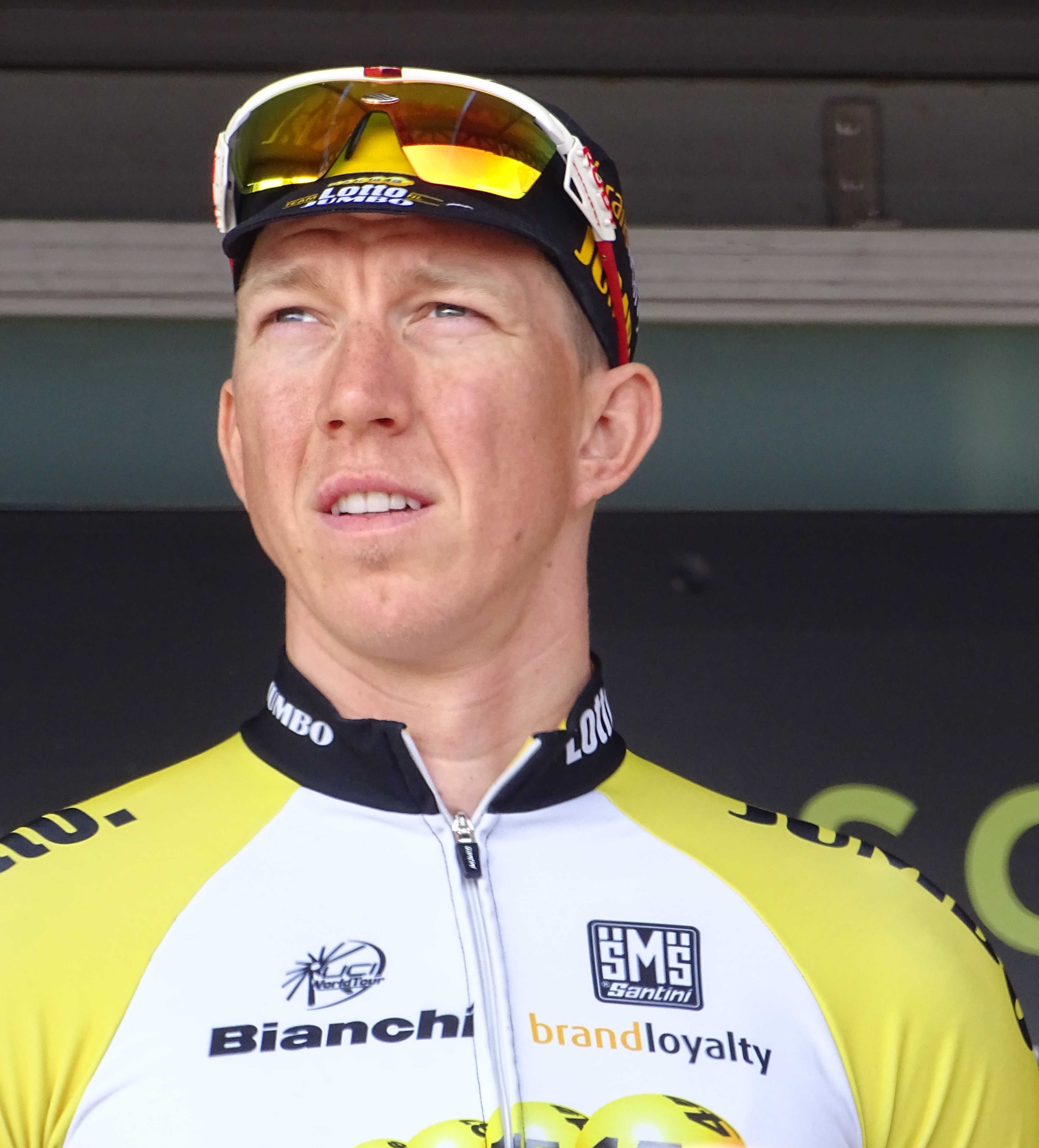 Reportage réalisé le mercredi 8 avril à l'occasion du départ du Grand Prix de l'Escaut 2015 à Anvers, Belgique.